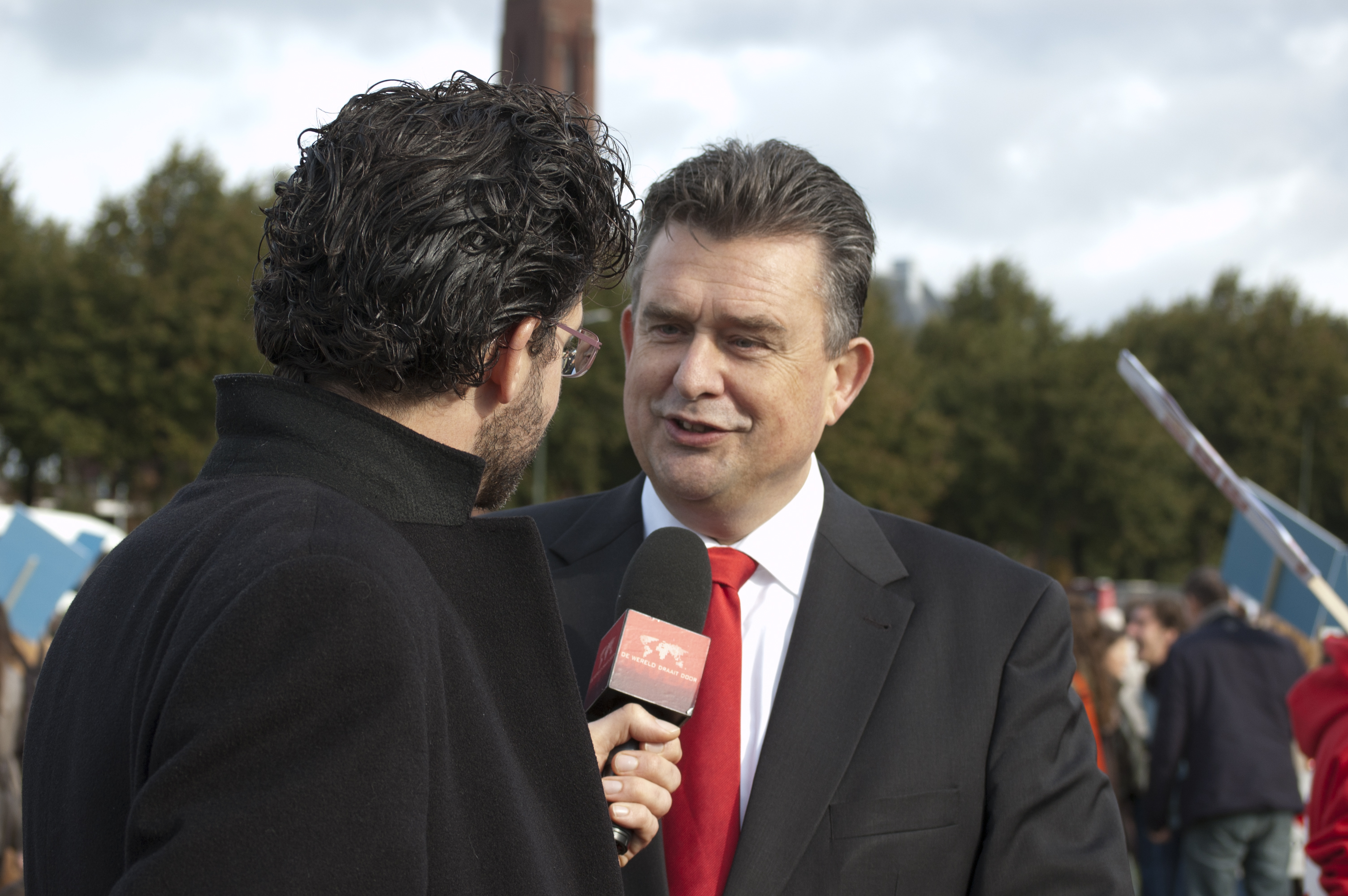 SP-leider Emile Roemer geeft een interview op het Malieveld aan Erik Dijkstra (bekend van o.a. 'De Jakhalzen')